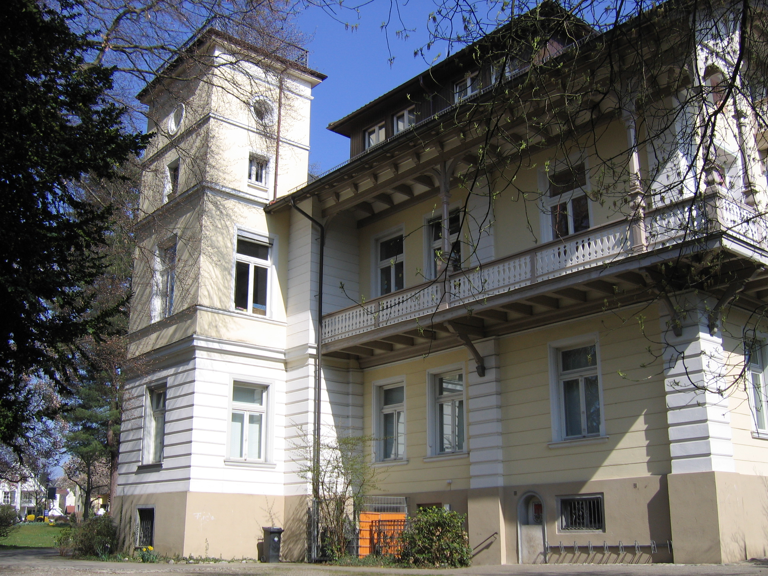 Deutschland - Baden-Württemberg - Bodenseekreis - Kressbronn am Bodensee, Seestraße 20: "Schlössle"